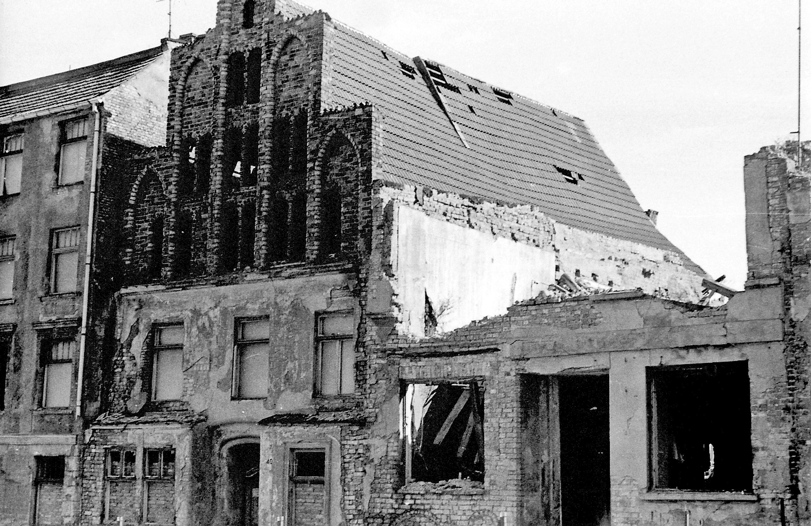 Hausbaumhaus in der Wokrenterstraße in Rostock